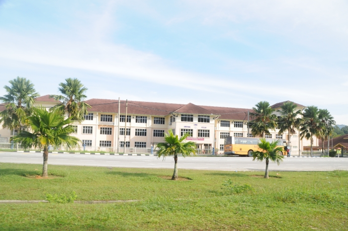 Sekolah Menengah Kebangsaan Ampang Pecah.